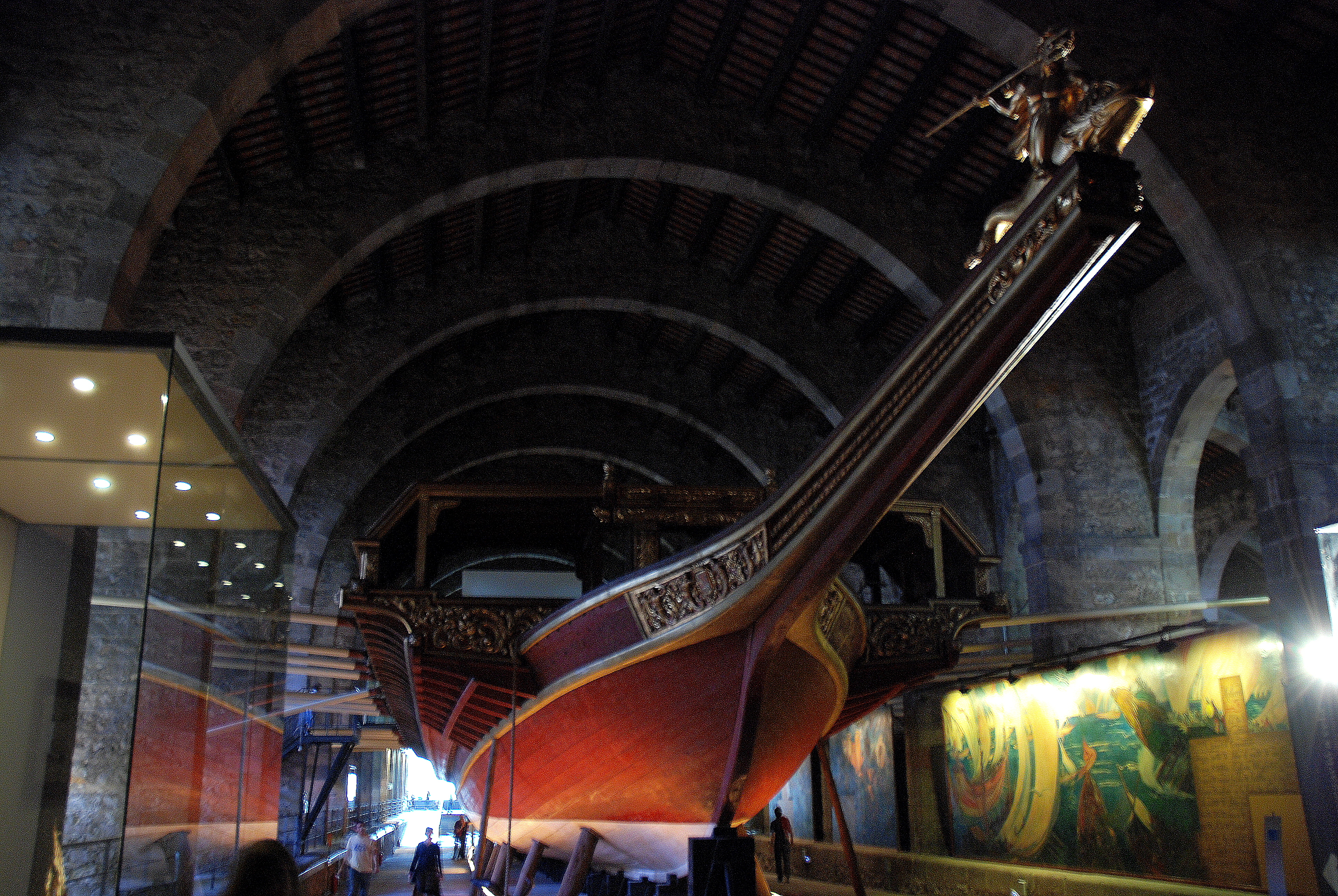 de Real, het vlaggenschip van Juan van Oostenrijk, in het Museu Marítim de Barcelona